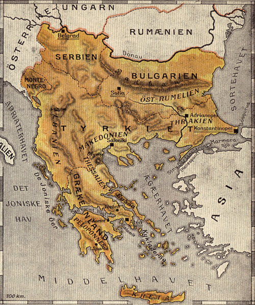 Europeisk del av Det osmanske riket.